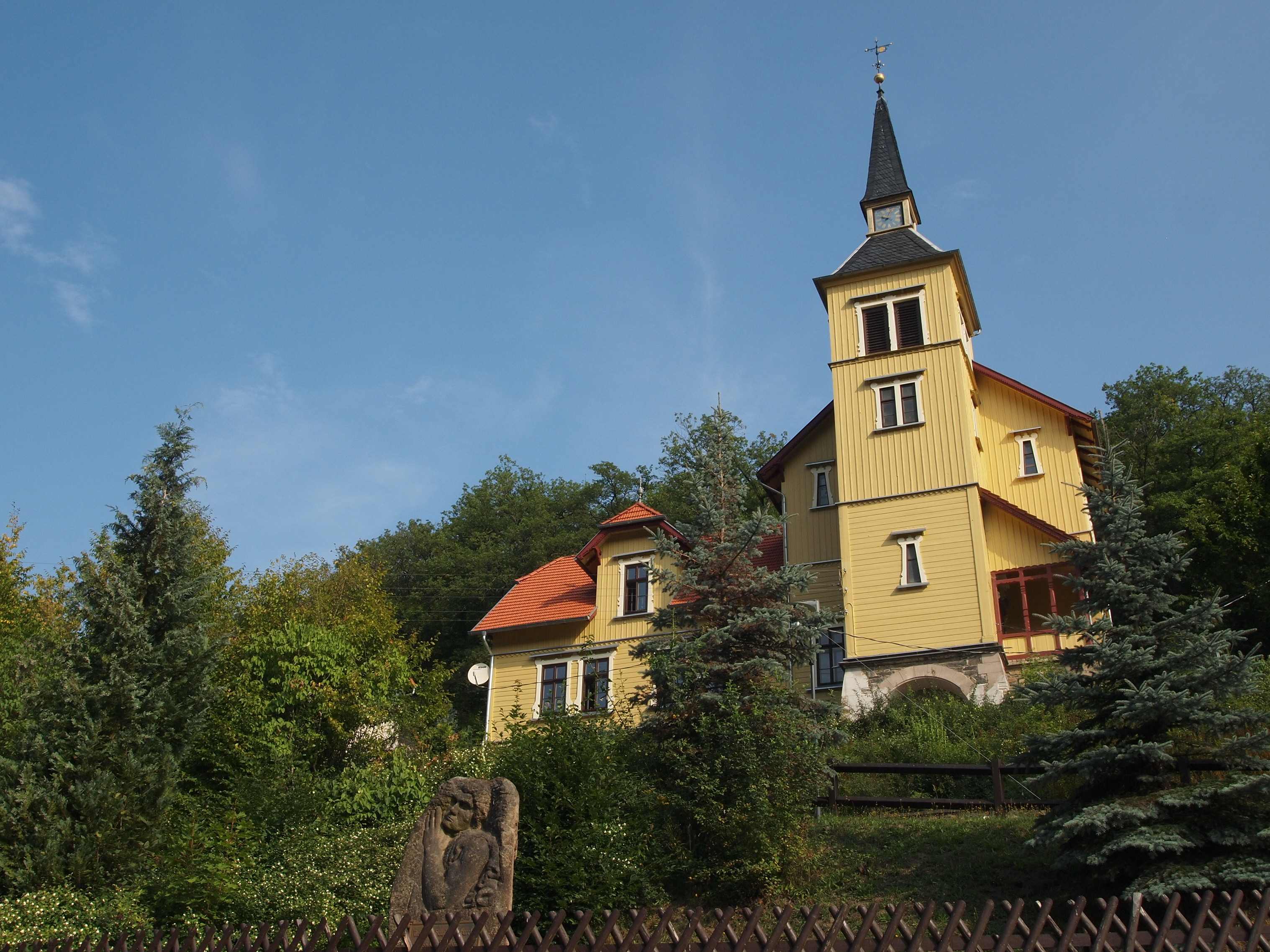 Kirche in Altenbrak, Landkreis Harz, Sachsen-Anhalt